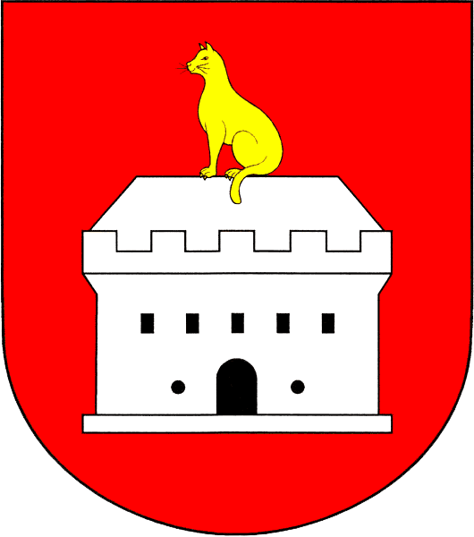 Znak obce Choťánky